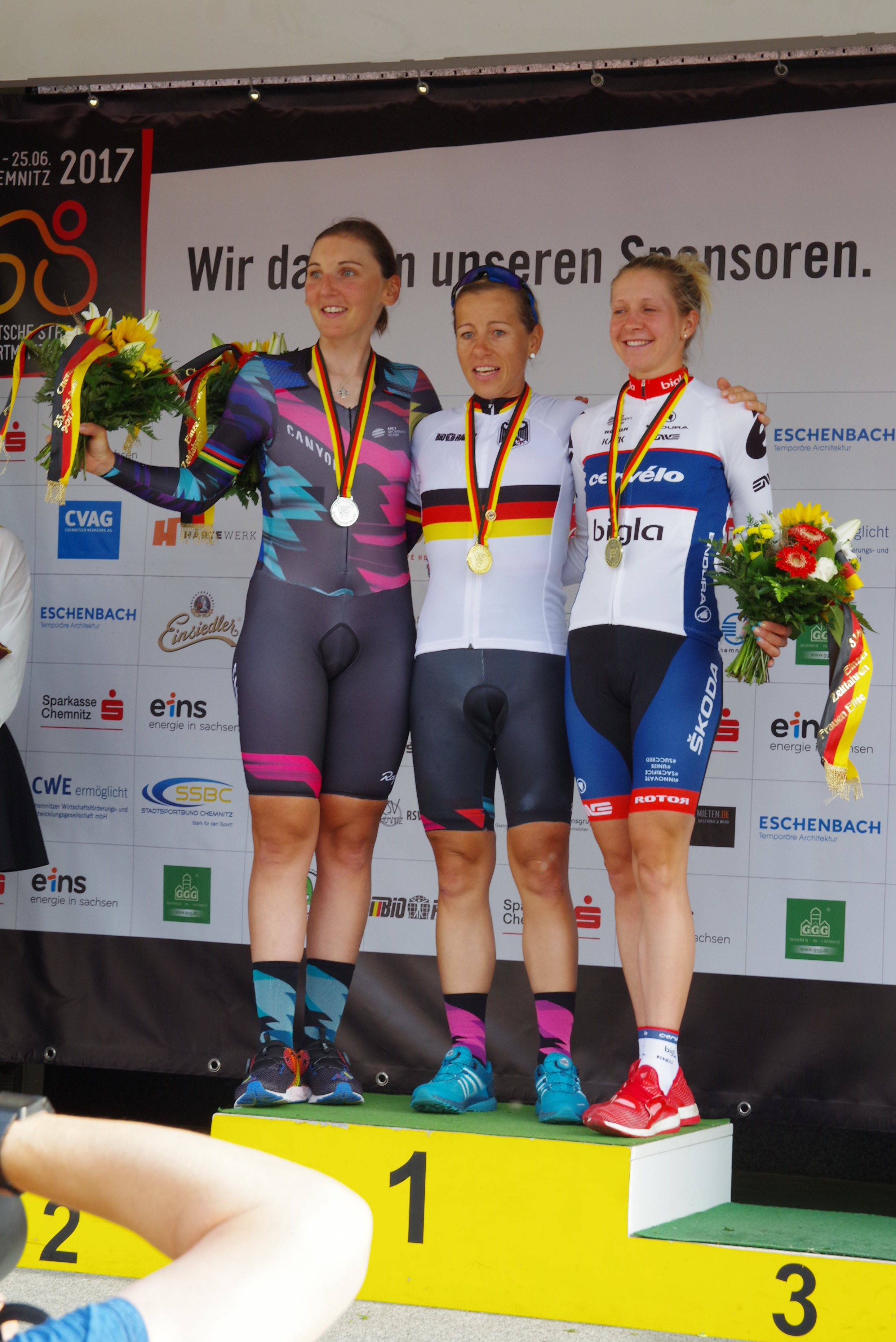 Deutsche Meisterschaften im Einzelzeitfahren 2017 23. Juni 2017 Siegerehrung Damen Platz 1: Trixi Worack Platz 2: Lisa Brennauer Platz 3: Stephanie Pohl The making of this document was supported by the Community-Budget of Wikimedia Germany.